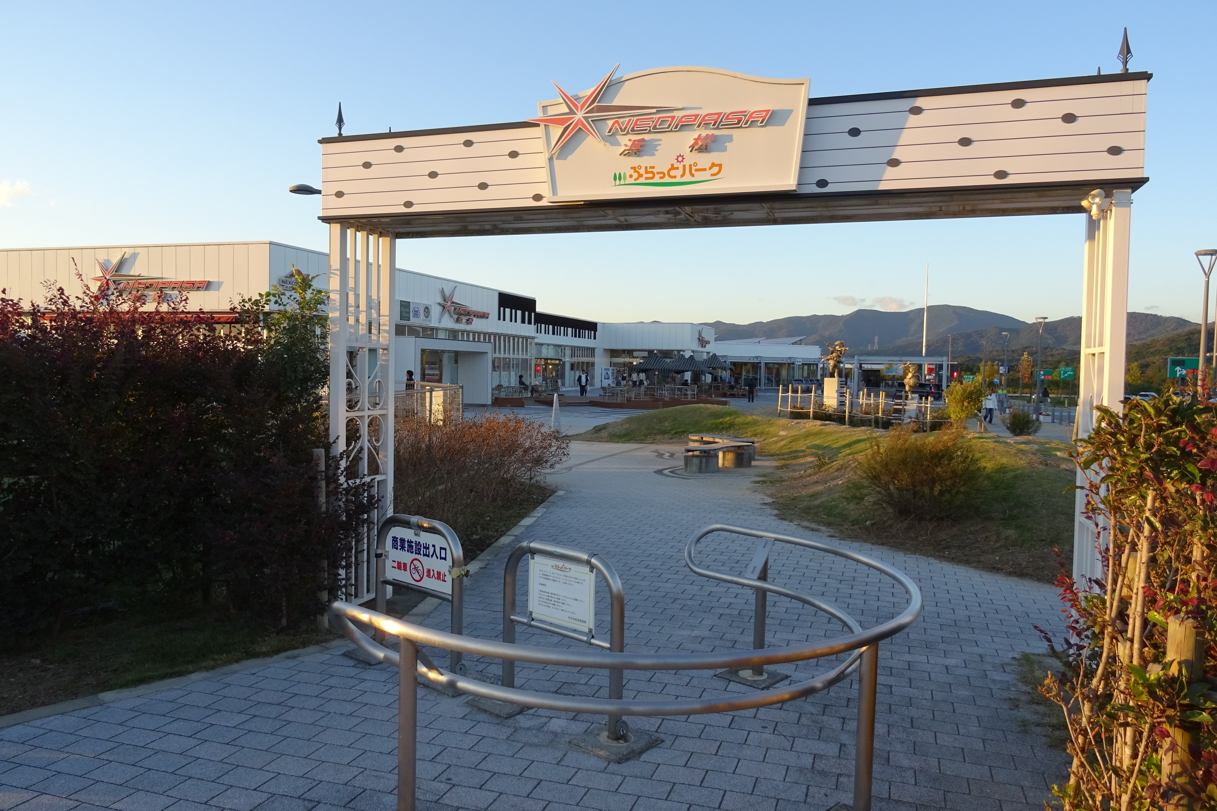 浜松サービスエリア